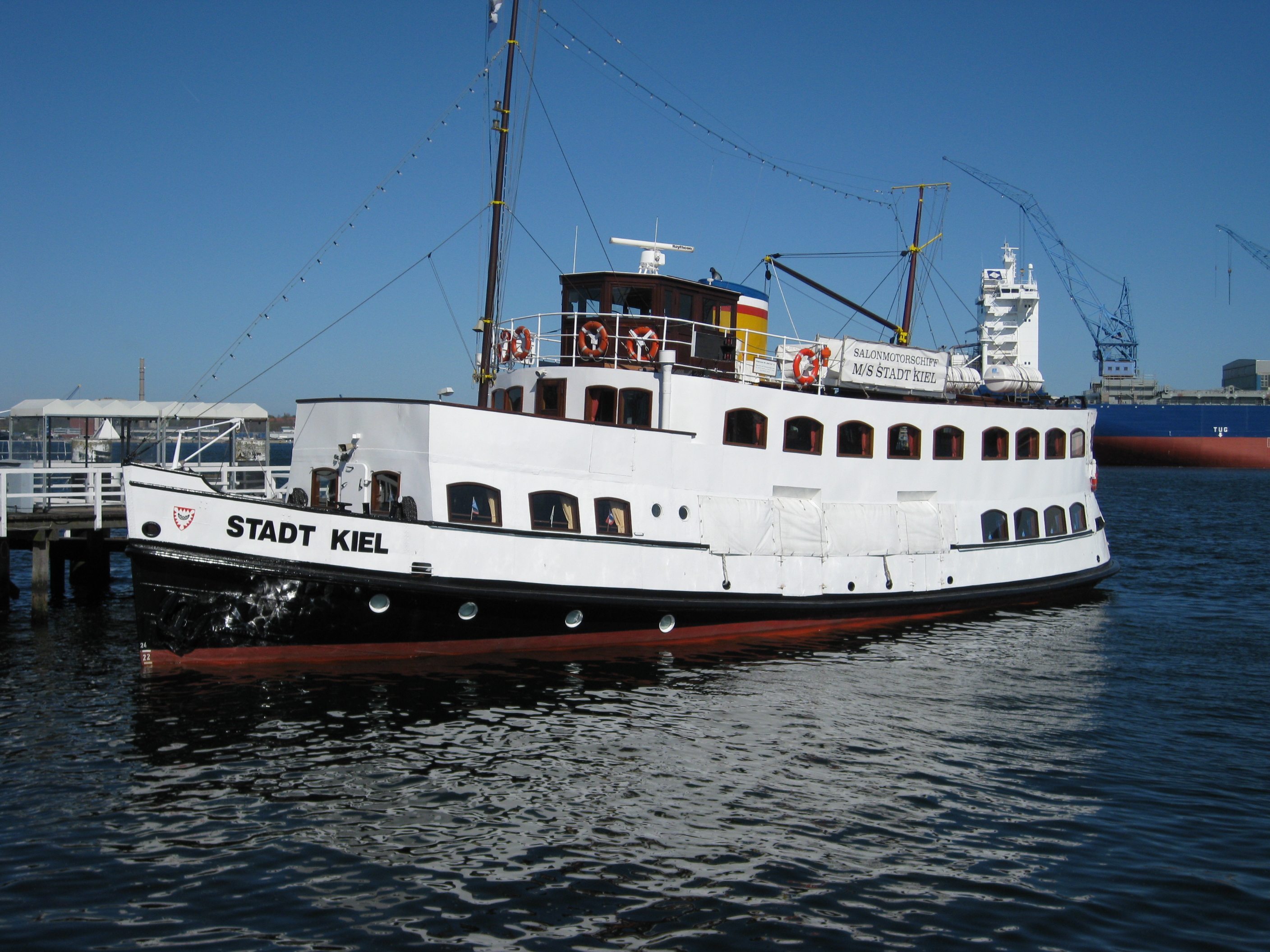 Das Museumsschiff Stadt Kiel des Kieler Schiffahrtsmuseum